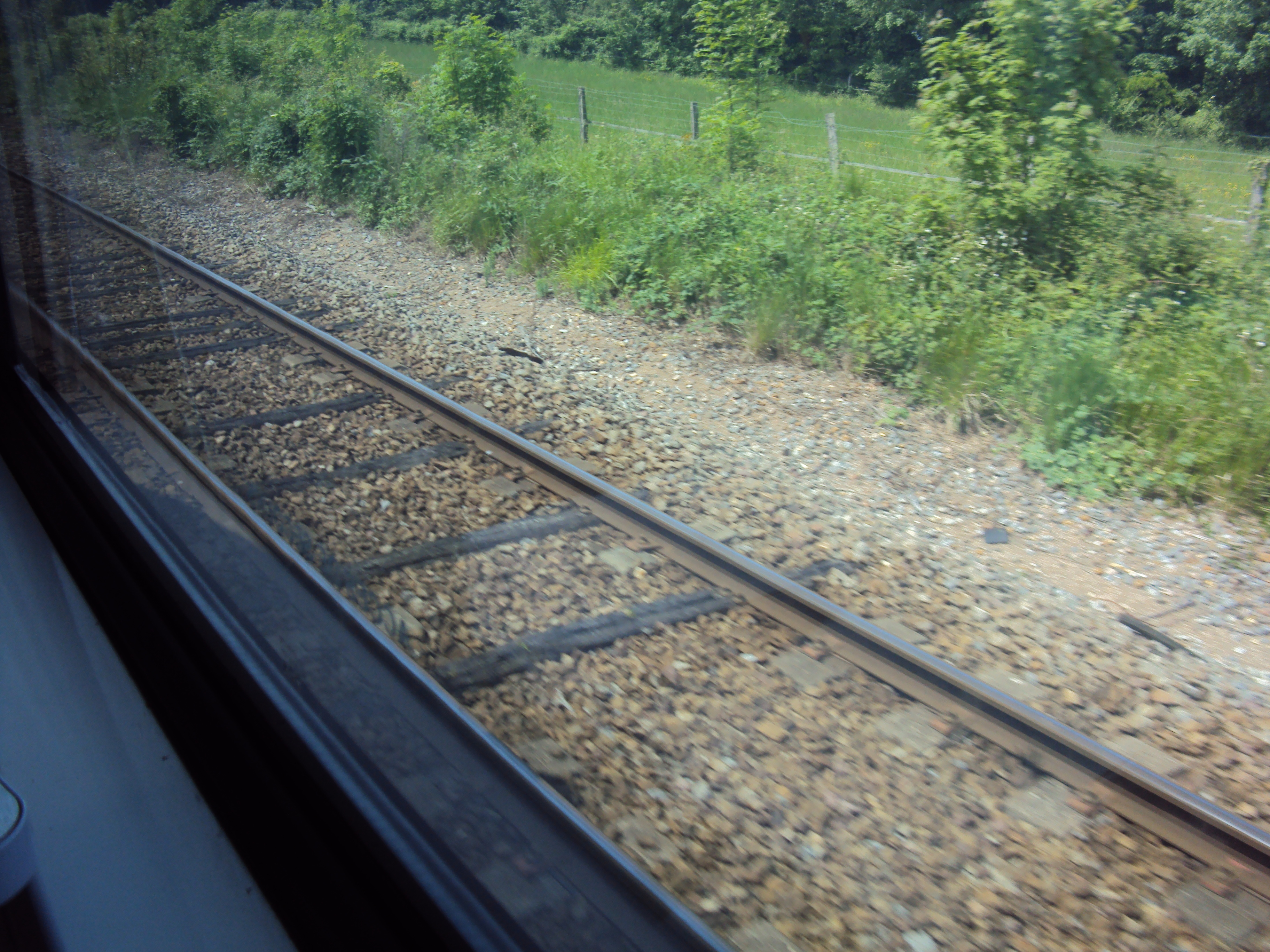 Alternance de traverse en bois et de traverses en béton Sur la ligne de Trilport à Bazoche au voisinage d'Isle